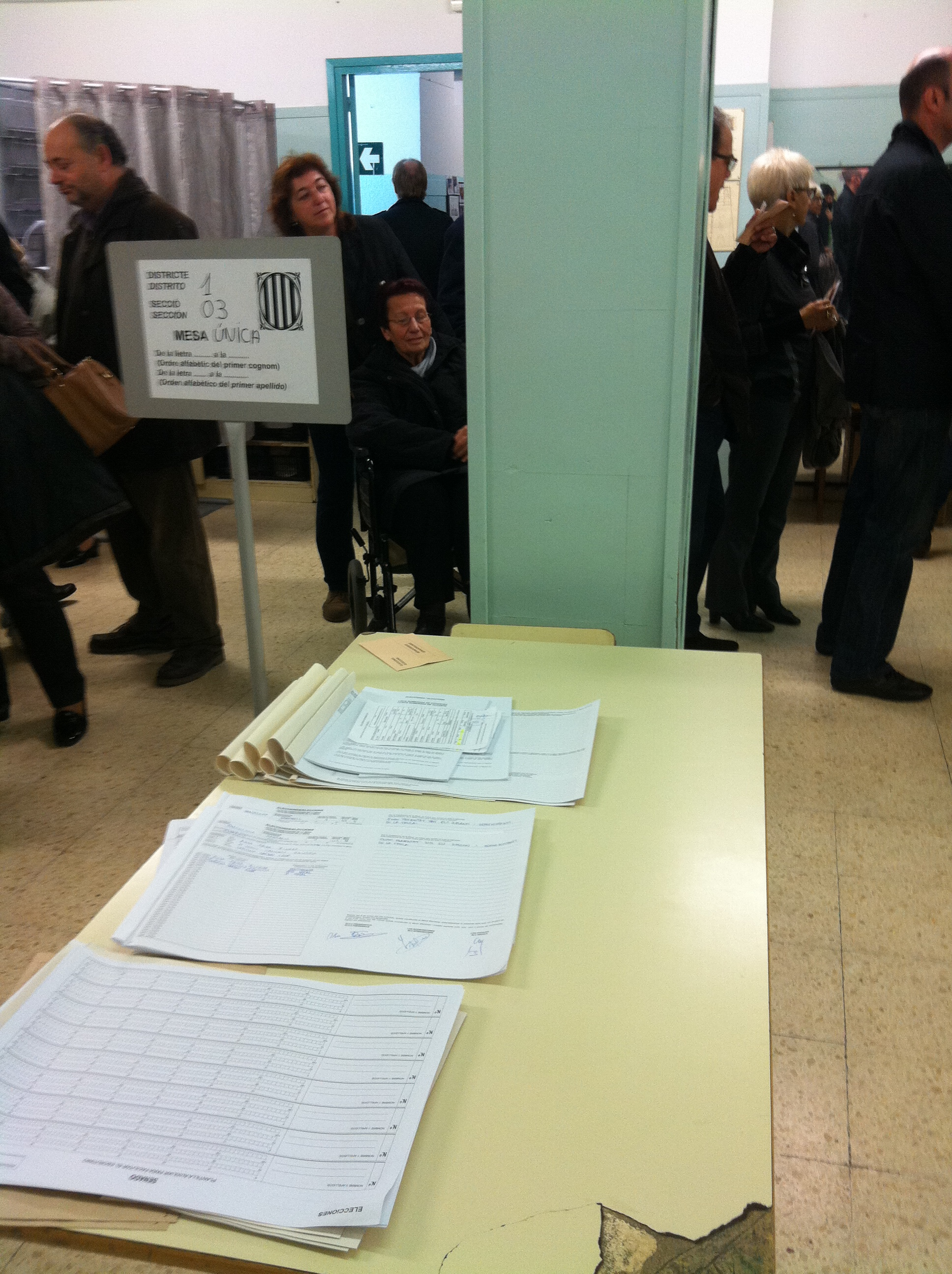 Eleccio s2011